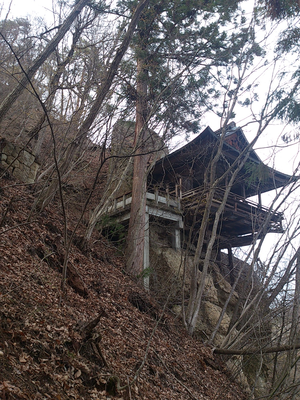 八櫛神社「ブランド薬師」（長野県長野市）